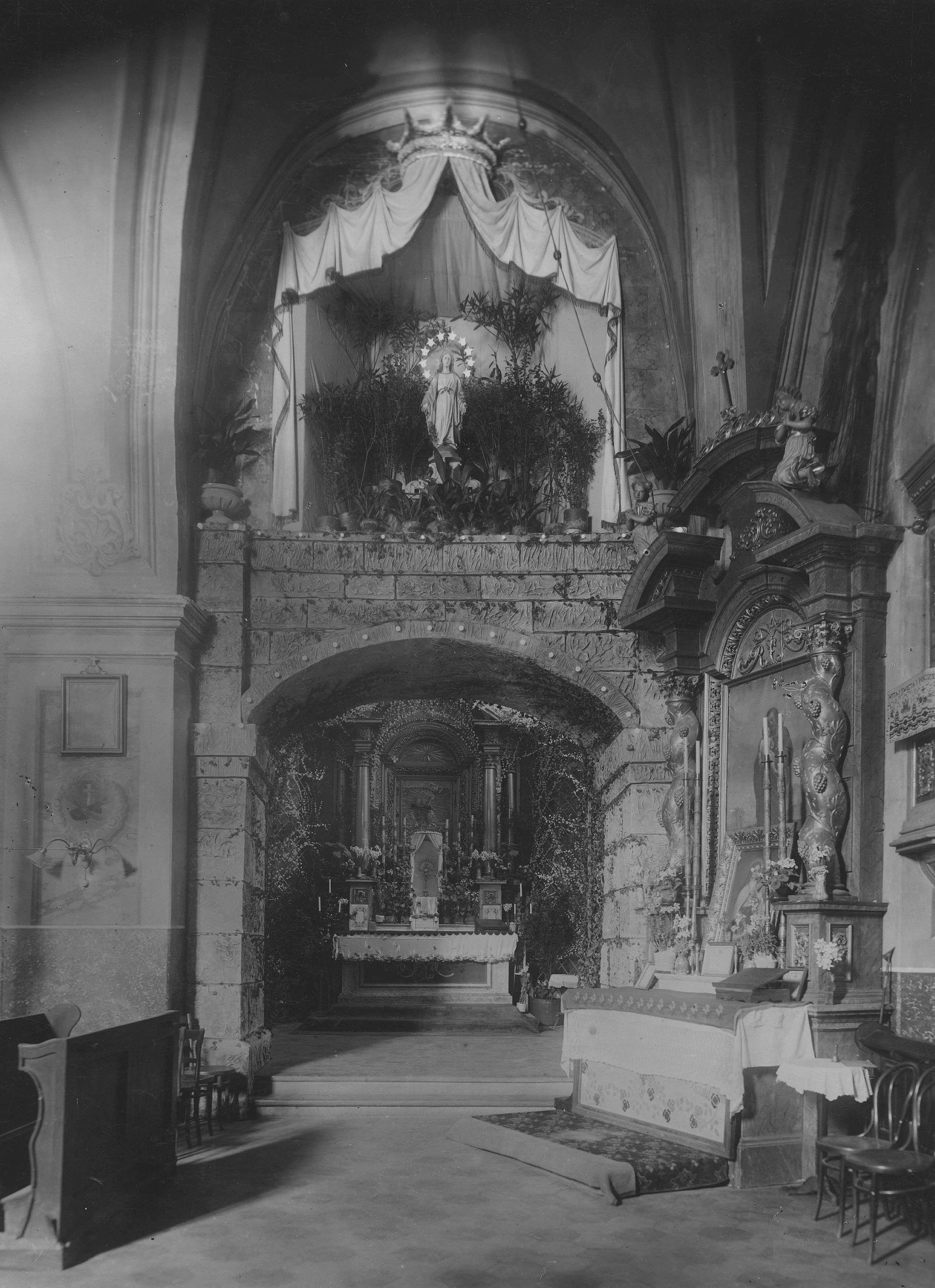 Lewa nawa w kościele franciszkanów w Sanoku. Fotografia z lat 1918-1939